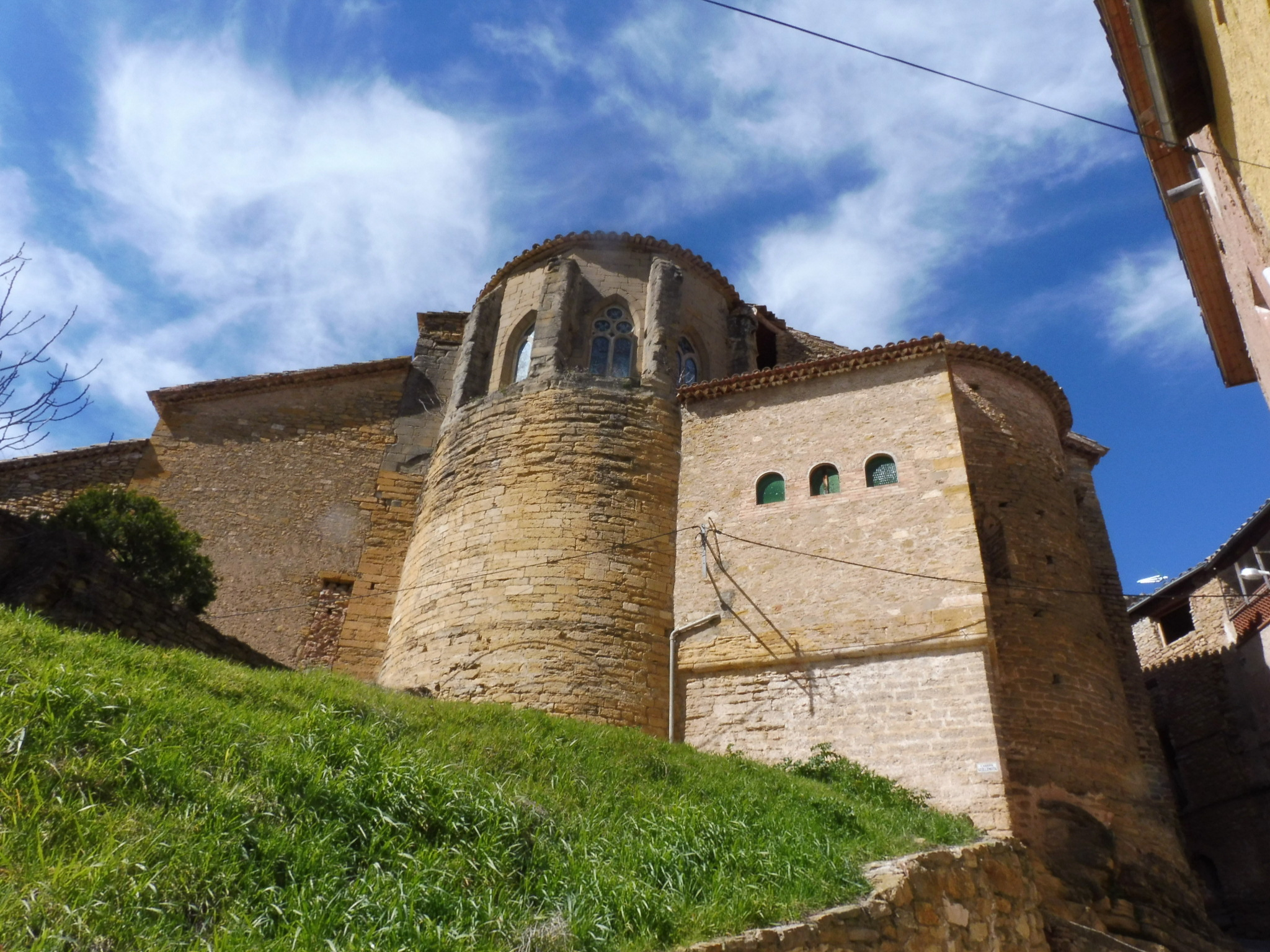 Església de Sant Vicenç d'Àger: absis